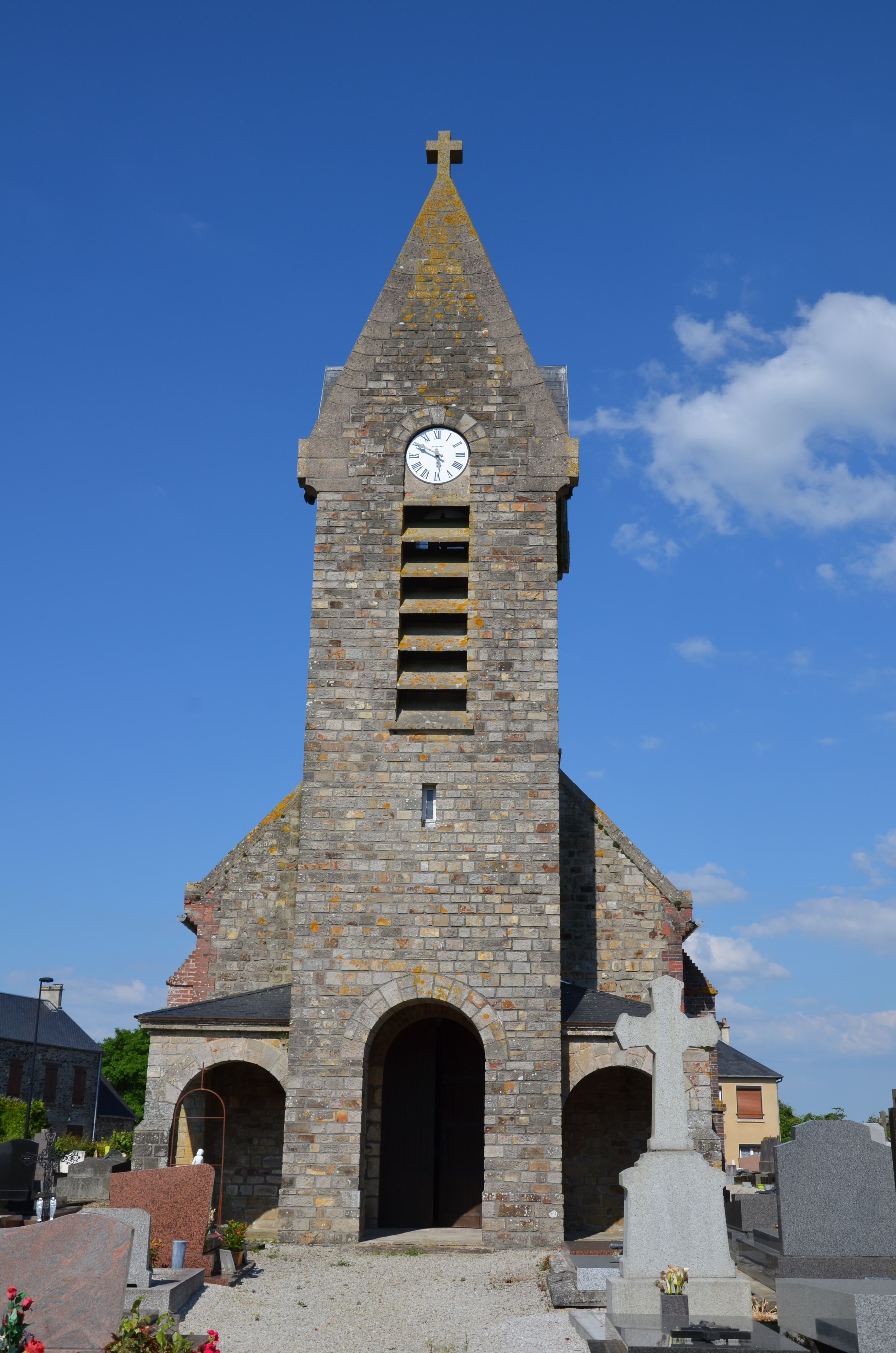 Église Saint-Jean de Saint-Jean-des-Essartiers.